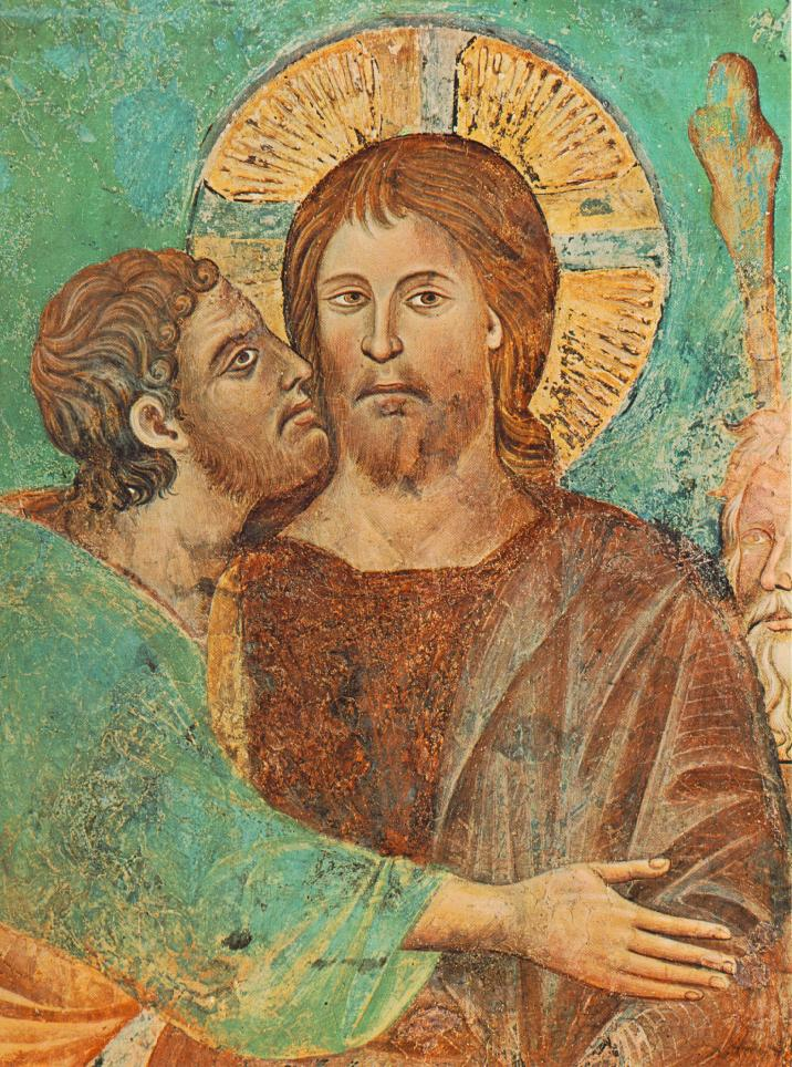 detail